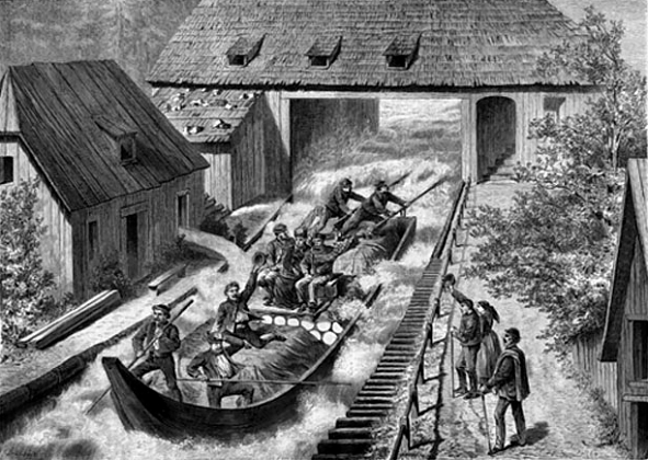 Fahrt mit dem Salzschiff durch die Traunfall-Schleuse. Ein Holzstich aus dem Jahr 1874.